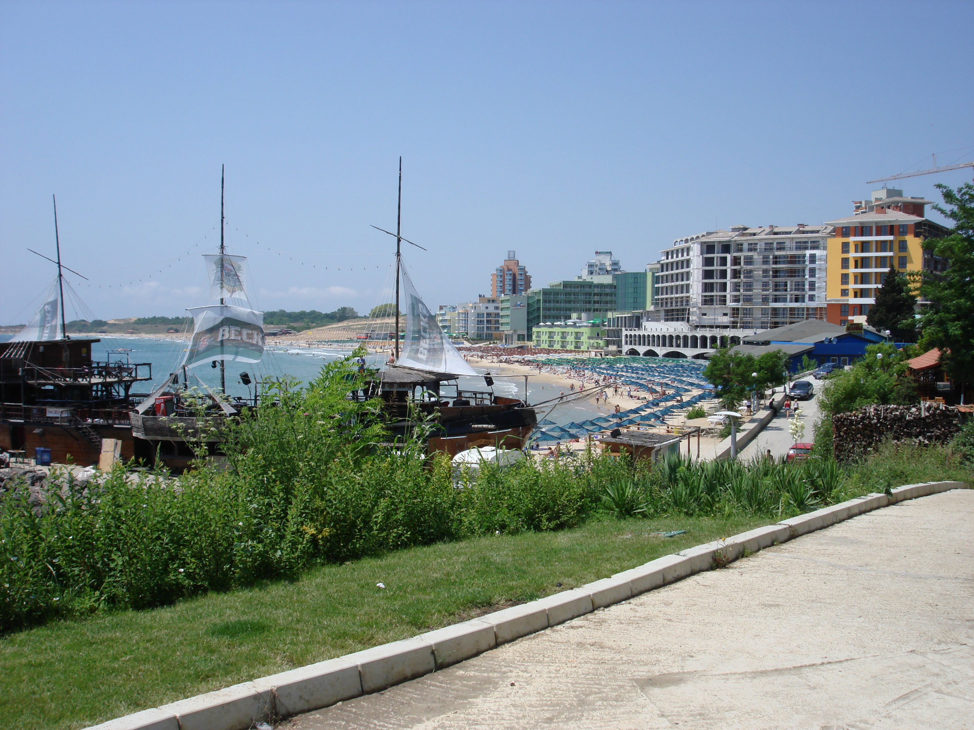 8230 Nessebar, Bulgaria